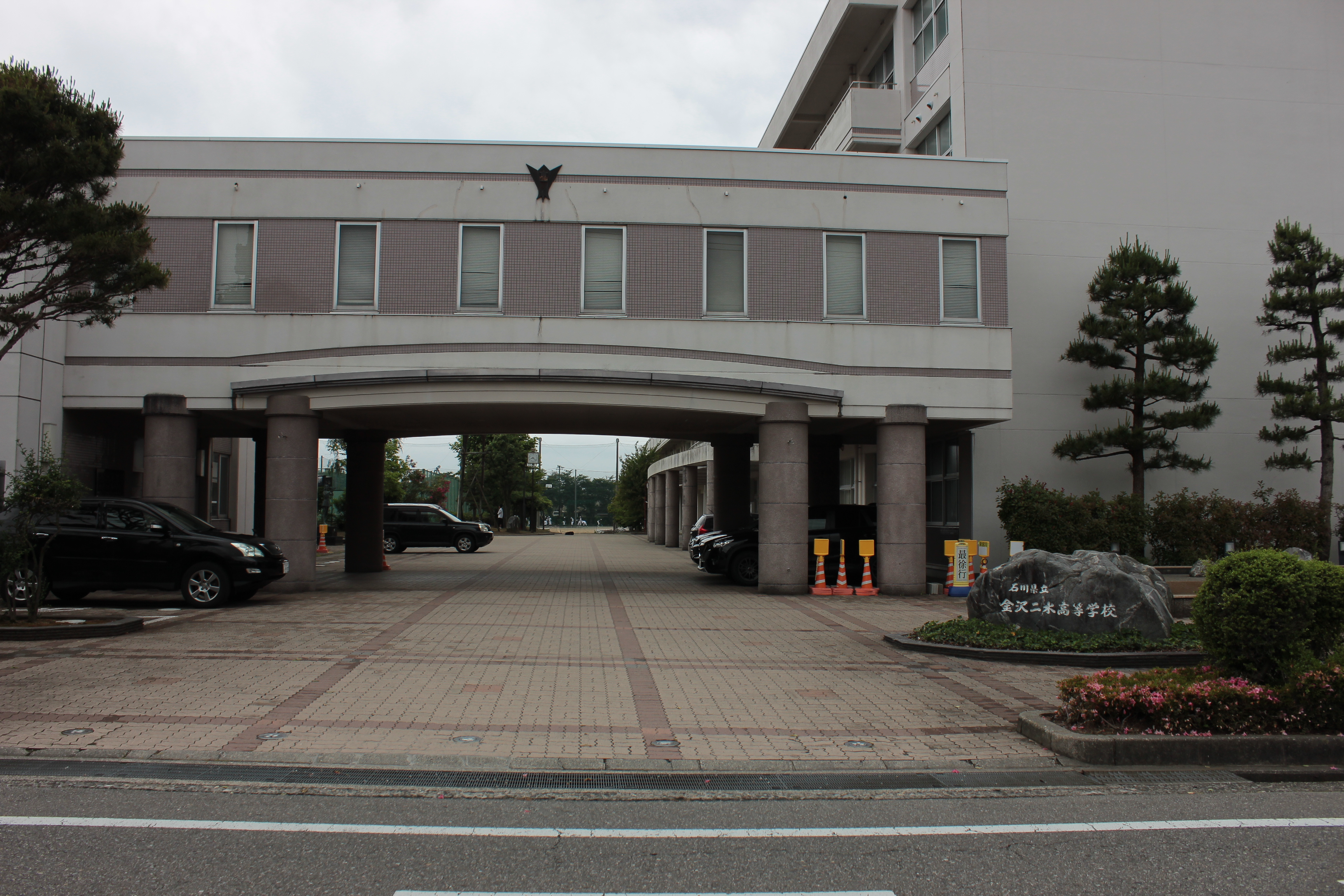 石川県立金沢二水高等学校（石川県金沢市） Canon EOS Kiss X5